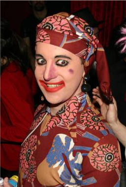 Tomasini auf einer Party.